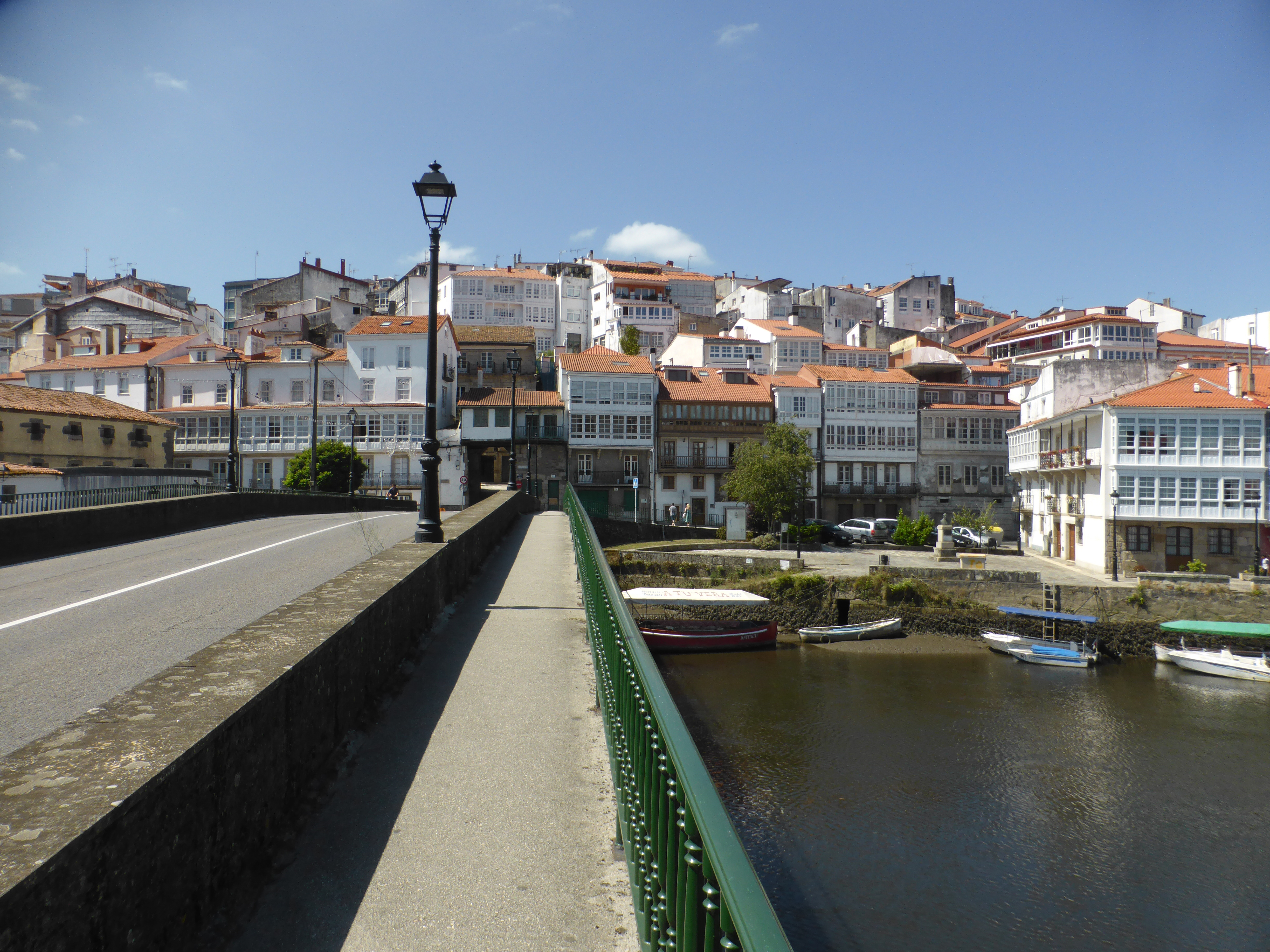 Por el puente viejo de Betanzos pasan los peregrinos que se dirigen a Santiago de Compostela. El camino inglés de Santiago continúa entrando a la ciudad por la "Porta Vella".